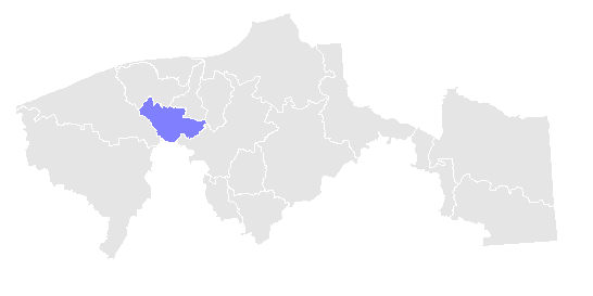 Cunduacán, Tabasco. Hecho con Microsoft Paint